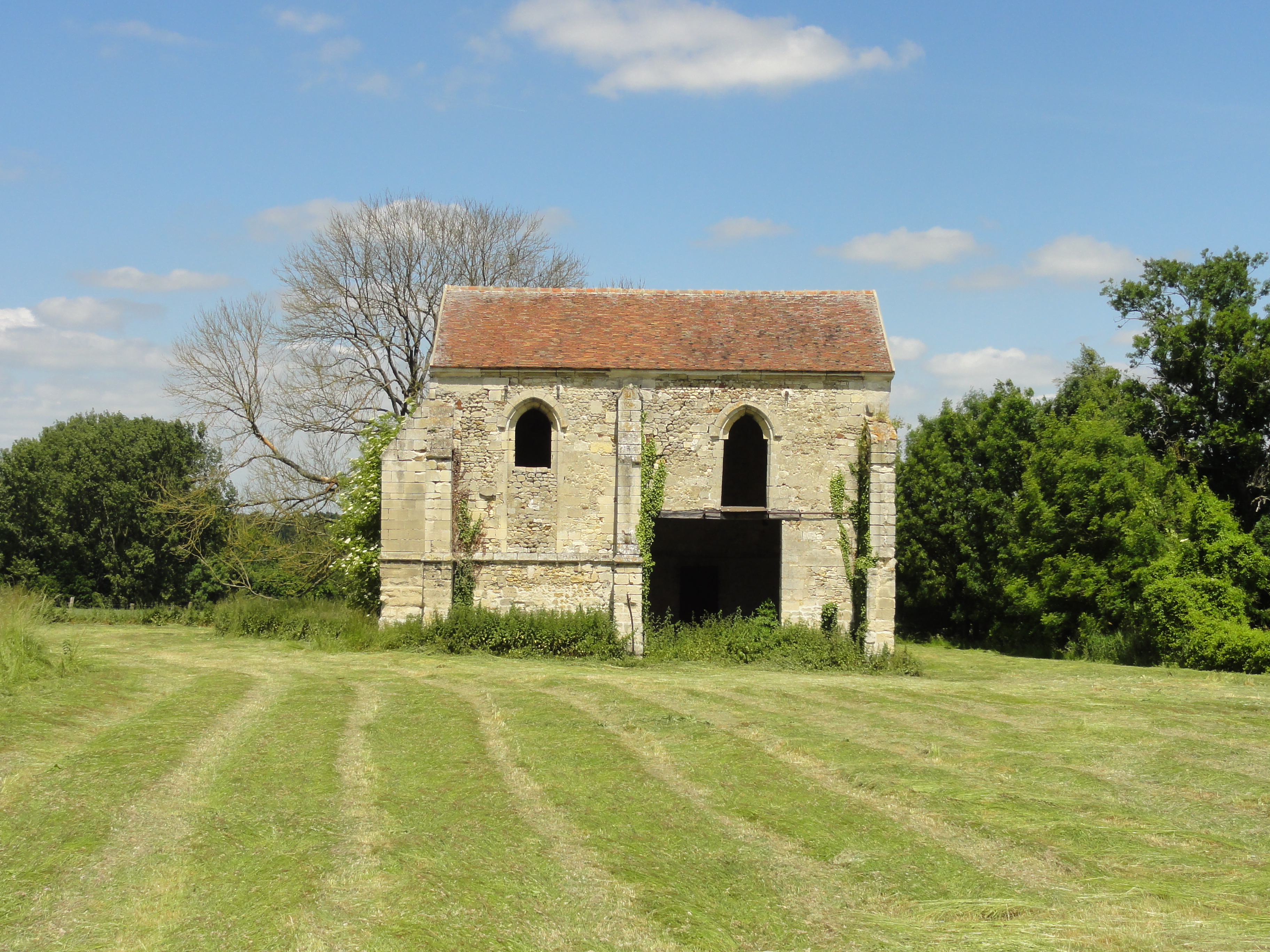 Ruine de l'église Notre-Dame du prieuré de Boucquy, hameau de la commune de Jaux.